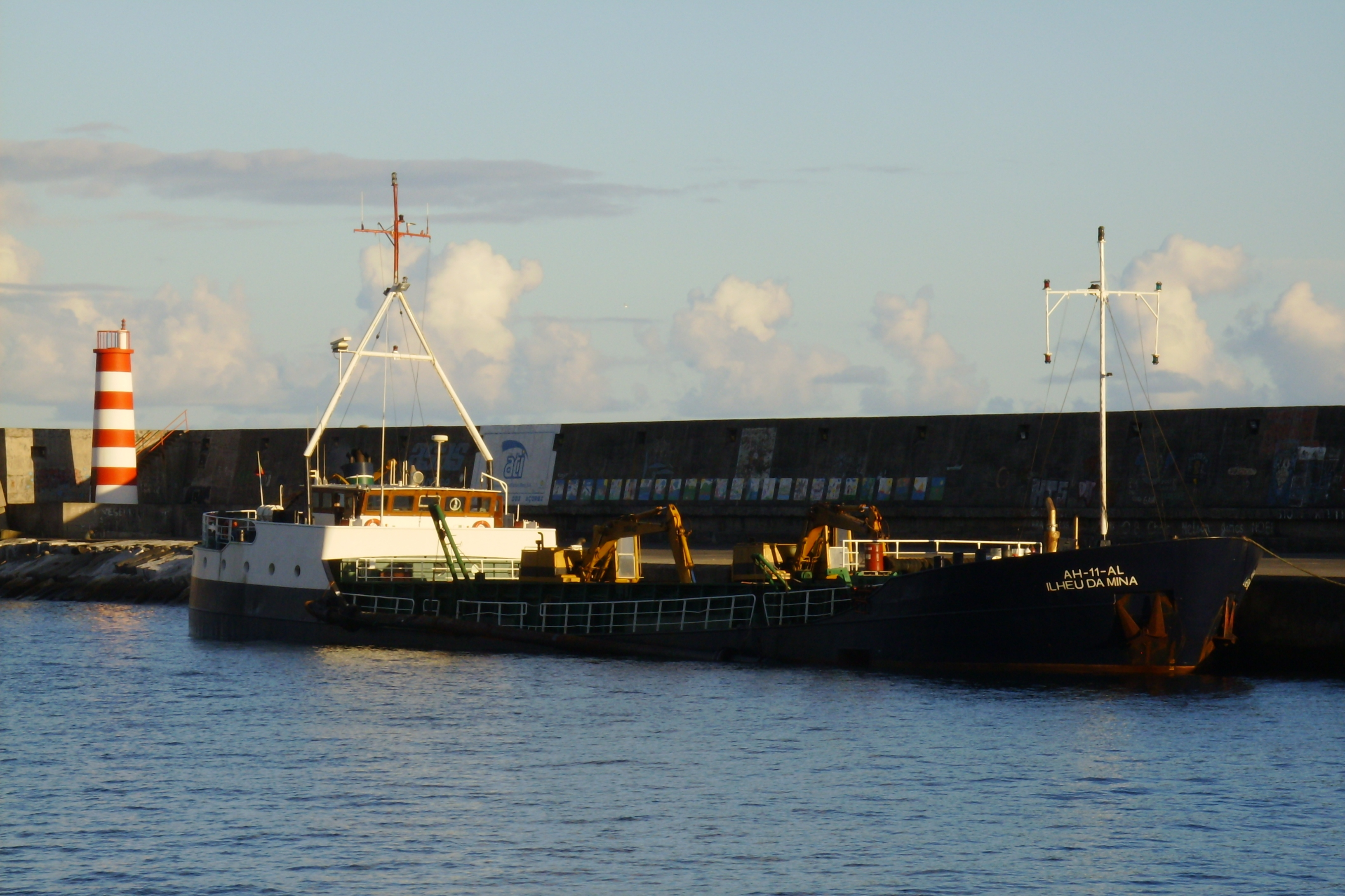 N/D Ilhéu da Mina, porto de Vila do Porto, ilha de Santa Maria, Açores. IMO 7533288 Callsign: CSMX9